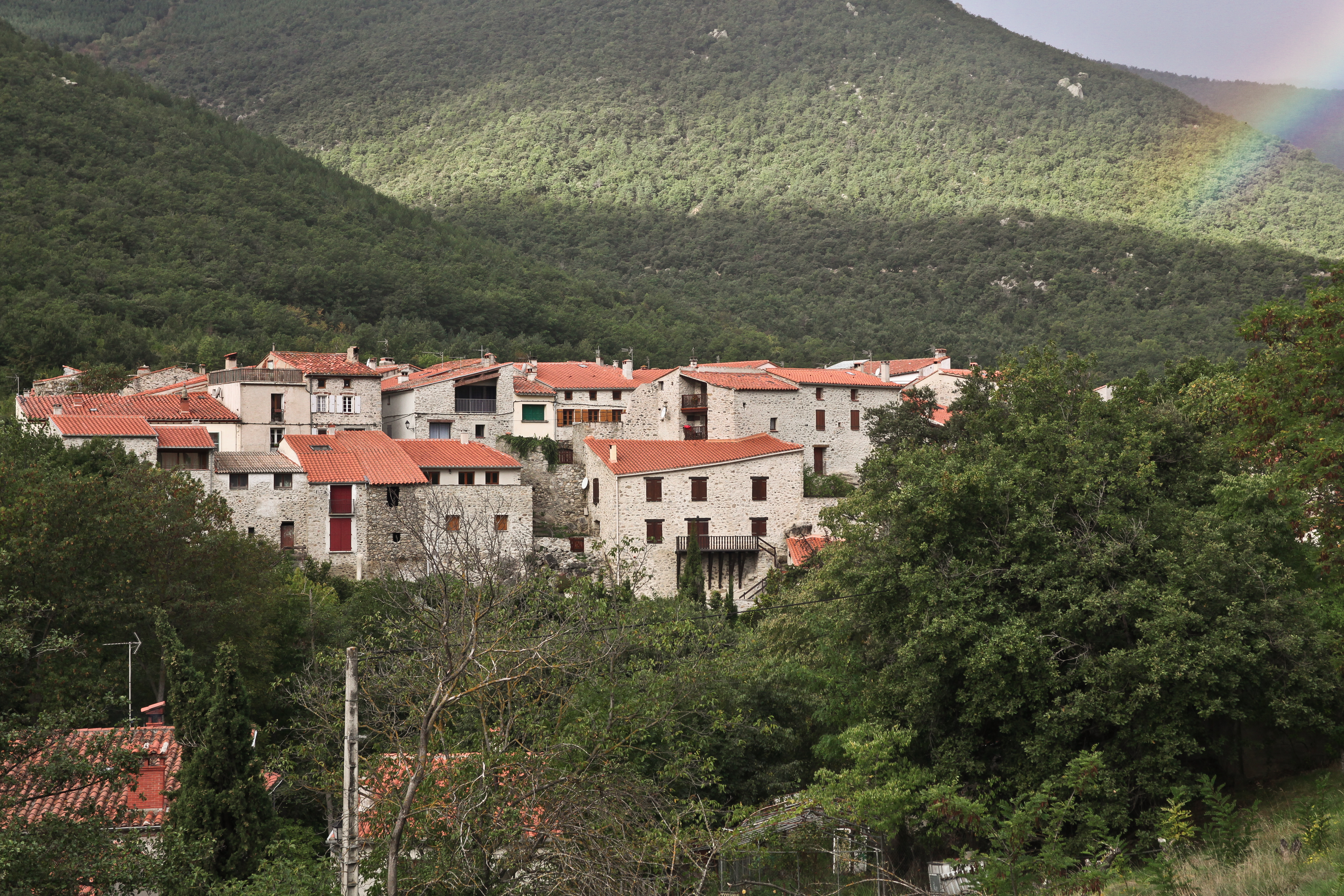 Village de Campôme en France